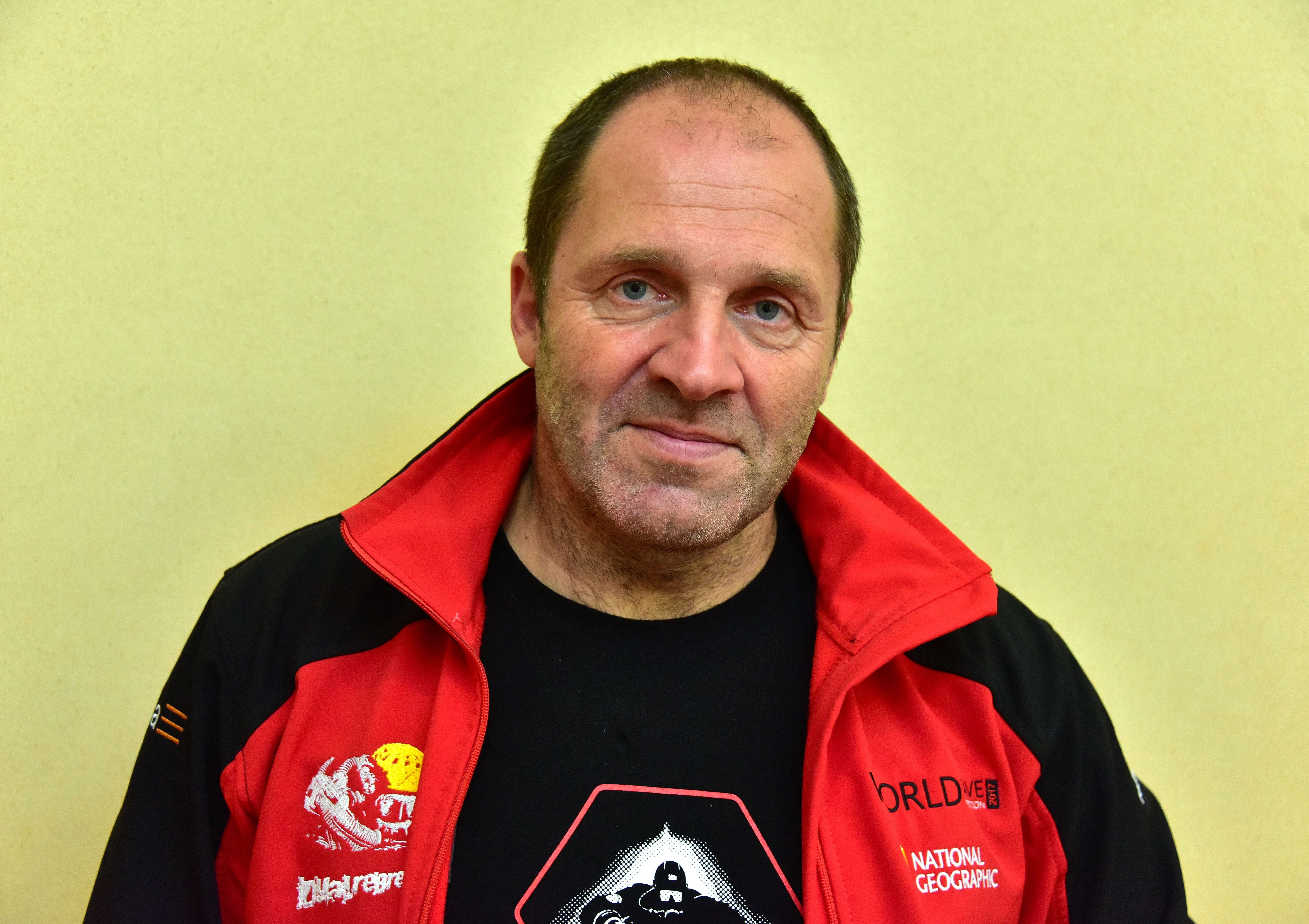 Krzysztof Starnawski podczas konferencji 6. Adaptive Manufacturing w Sektorze FMCG w hotelu Courtyard by Marriott w Warszawie